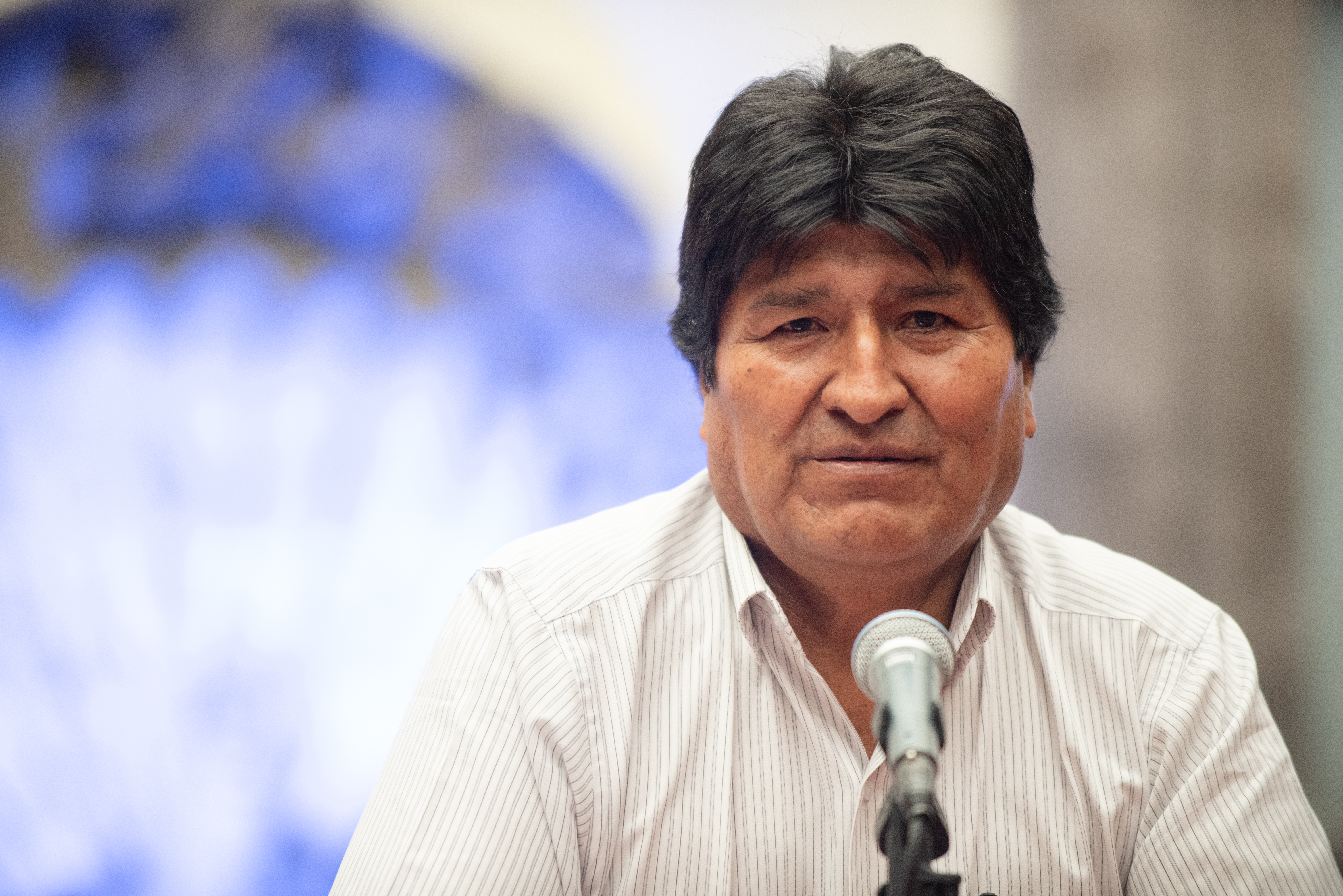 El político boliviano en conferencia de prensa en el Museo de la Ciudad de México.